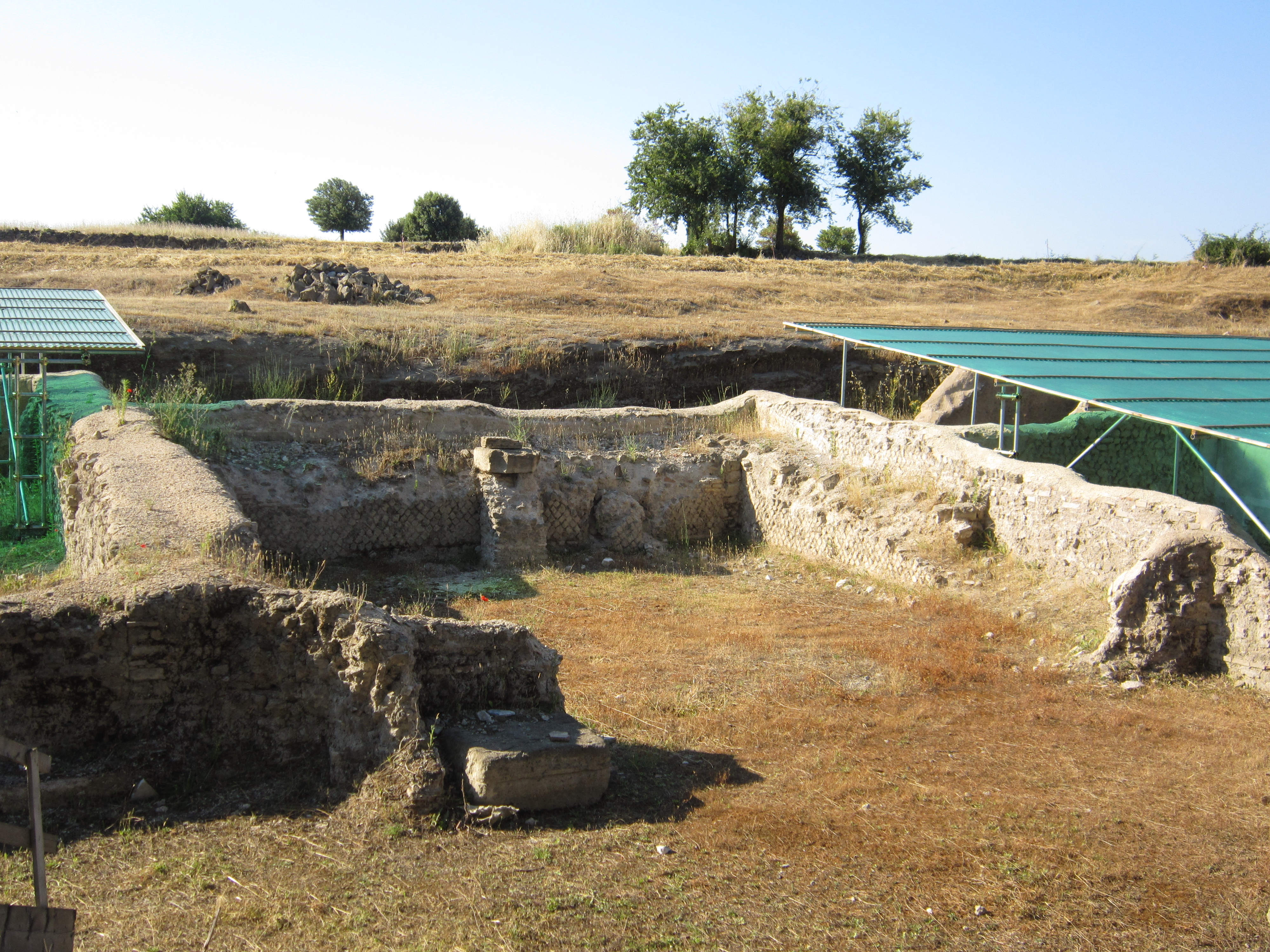 Gabii